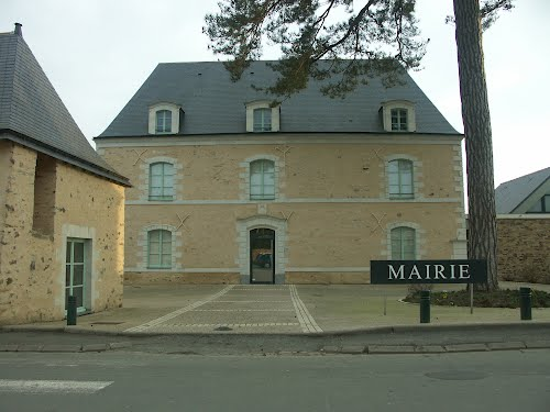 Presbytère de 1738 restructuré et rénové en Mairie en 2006